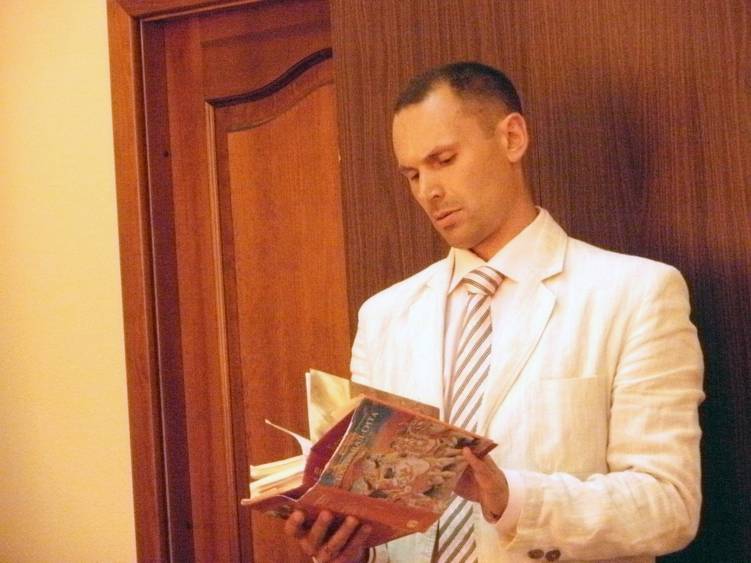 Представитель защиты Александр Шахов на первом судебном заседании по делу о признании книги "Бхагавад-гита как она есть" экстремистским материалом.